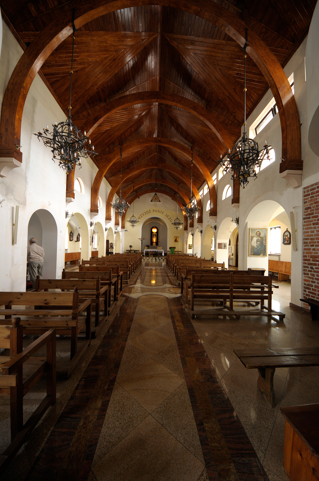 kościół par. p.w. Miłosierdzia Bożego i św. Faustyny, 1873, 1936-38 Warszawa, ul. Żytnia 1, Wola 08.2003.